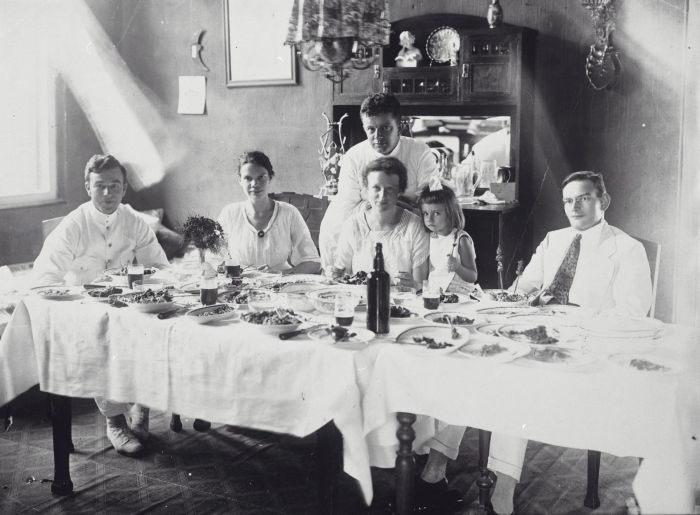 Foto. Groepsportret rond tafel met rijsttafel